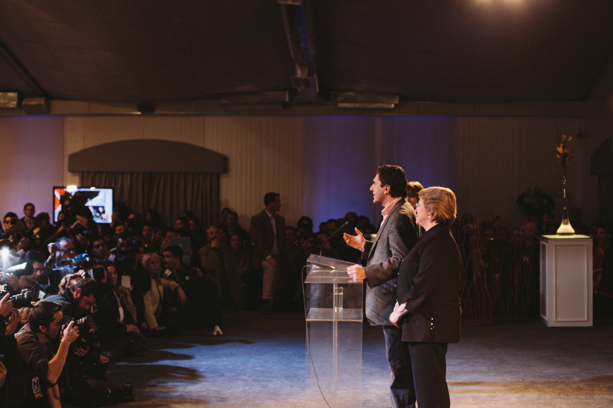 José Antonio Gómez da su respaldo a Michelle Bachelet, en las primarias de 2013.